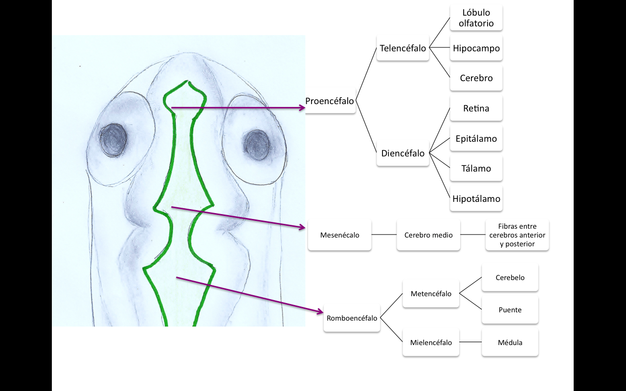 Esquema sobre el desarrollo del cerebro temprano y posterior formación de partes cerebrales típicas.